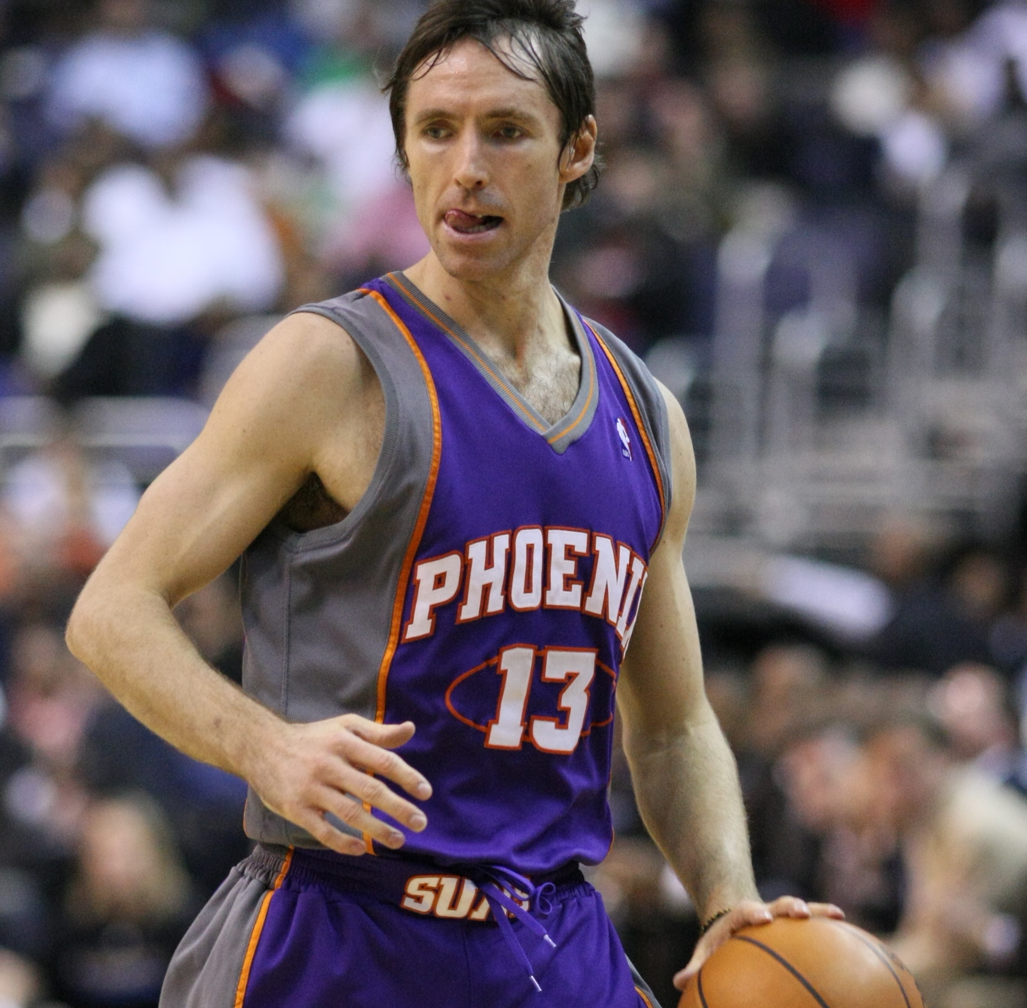 El jugador canadiense de baloncesto Steve Nash.